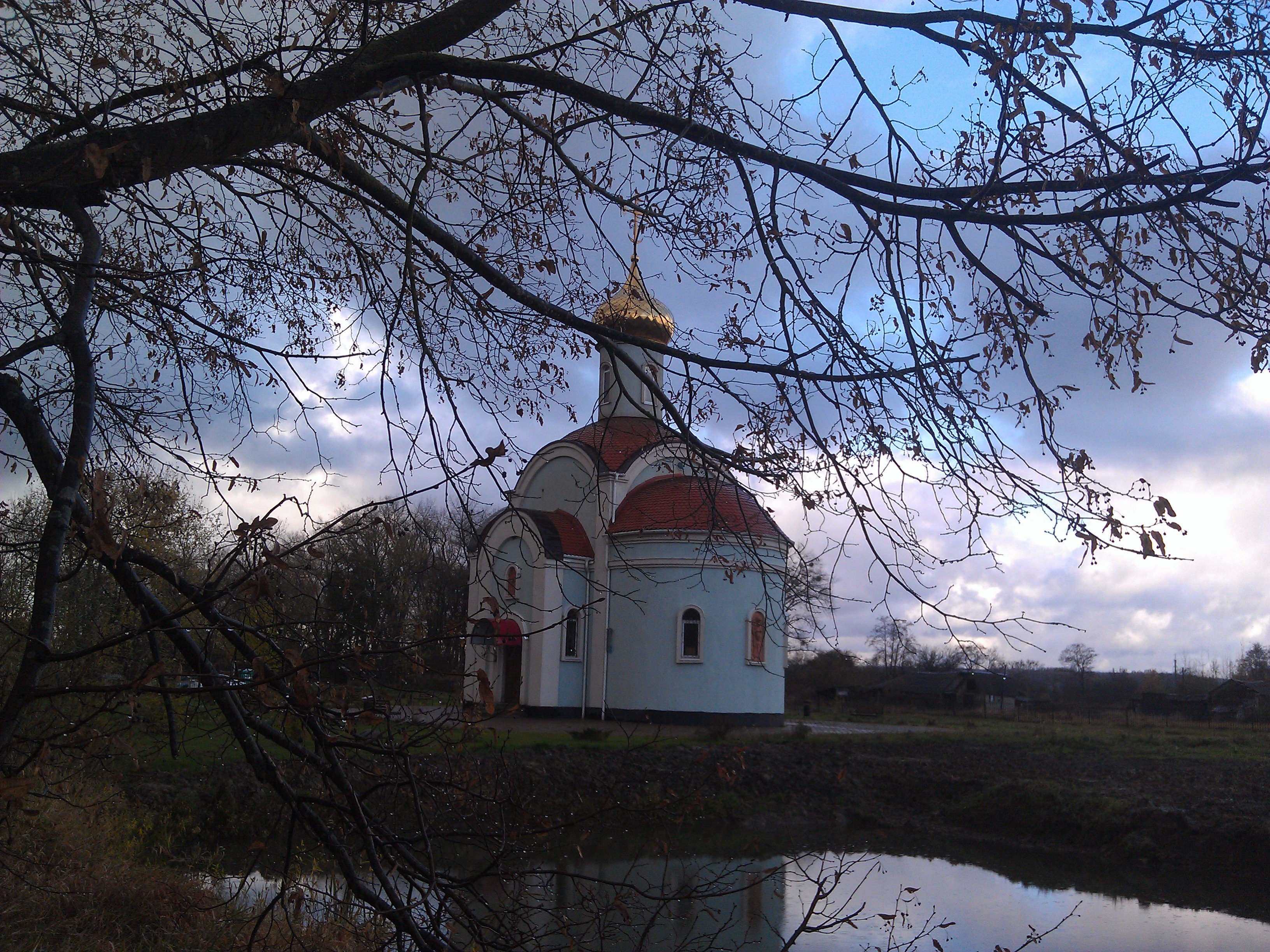 Пейзаж с Ксеньевским храмом и водоемом в посёлке Люблино